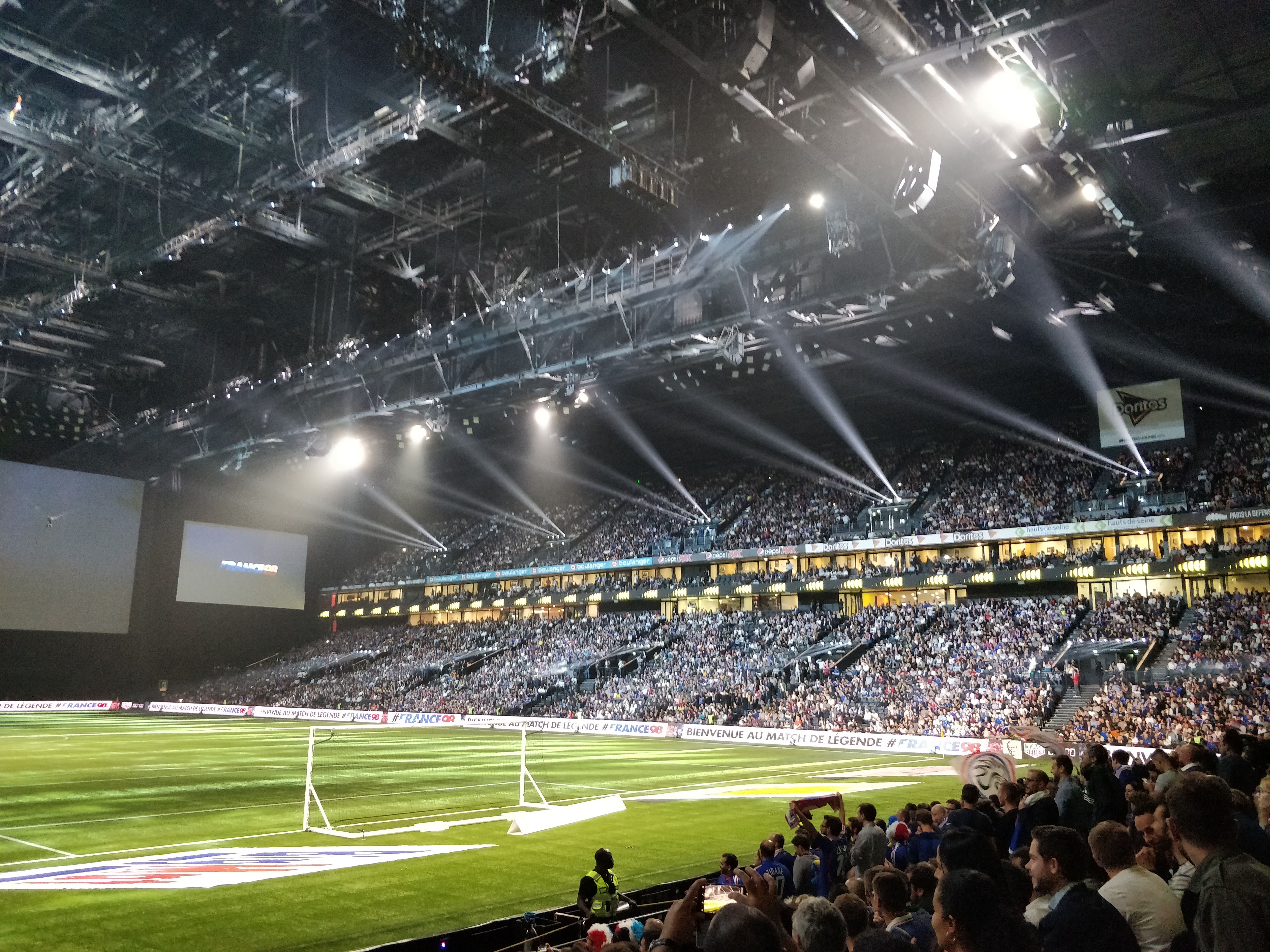 Match de gala France 98-FIFA 98, le 12 juin 2018 à la U Arena